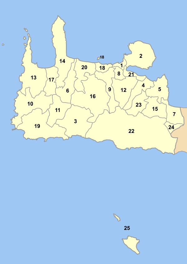 Map of Chania prefecture (Greece) with administrative divisions (municipalities and communities) numbered in alphabetical order (in greek). Legend: 1. Δήμος Χανίων - Chania 2. Δήμος Ακρωτηρίου - Akrotiri 3. Δήμος Ανατολικού Σελίνου - Anatoliko Selino 4. Δήμος Αρμένων - Armeni 5. Δήμος Βάμου - Vamos 6. Δήμος Βουκολίων - Voukolies 7. Δήμος Γεωργιούπολης - Georgioupoli 8. Δήμος Ελευθερίου Βενιζέλου - Eleftherios Venizelos 9. Δήμος Θερίσου - Theriso 10. Δήμος Ινναχωρίου - Innachori 11. Δήμος Καντάνου - Kandanos 12. Δήμος Κεραμιών - Keramia 13. Δήμος Κισσάμου - Kissamos 14. Δήμος Κολυμβαρίου - Kolymvari 15. Δήμος Κρυονερίδας - Kryonerida 16. Δήμος Μουσούρων - Mousouri 17. Δήμος Μυθήμνης - Mythimna 18. Δήμος Νέας Κυδωνίας - Nea Kydonia 19. Δήμος Πελεκάνου - Pelekanos 20. Δήμος Πλατανιά - Platanias 21. Δήμος Σούδας - Souda 22. Δήμος Σφακίων - Sfakia 23. Δήμος Φρε - Fres 24. Κοινότητα Ασή Γωνιάς - Asi Gonia 25. Κοινότητα Γαύδου - Gavdos